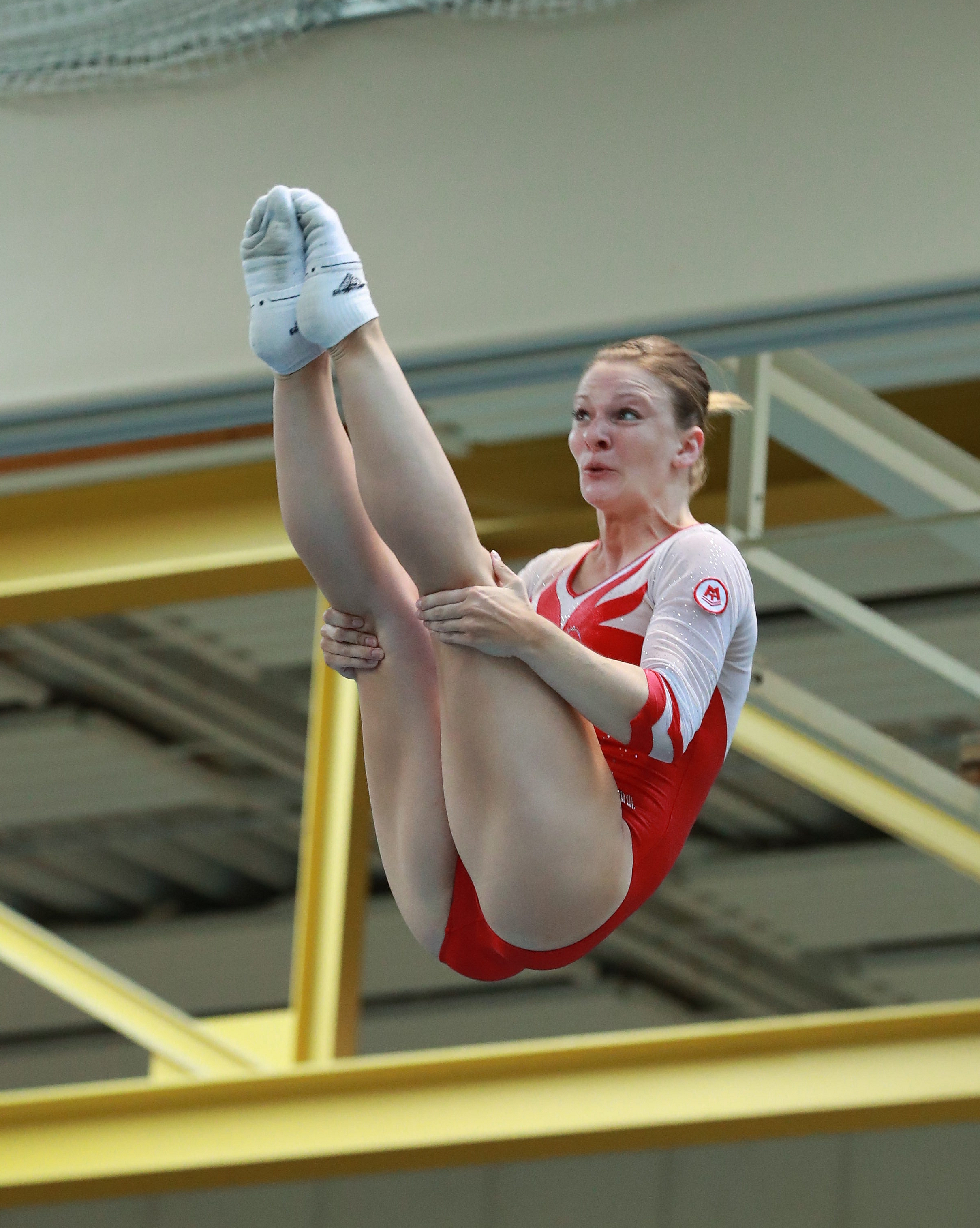 Wettkampf 9 Elite weiblich Erwachsene 2001 und älter Finale beim 9. Internationalen Filder Pokal im Trampolinturnen 2018 in Ruit. Abgebildet: Leonie Adam.